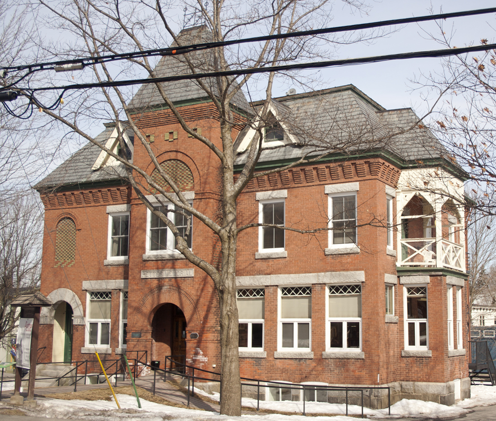 Façade de la Bibliothèque Pettes